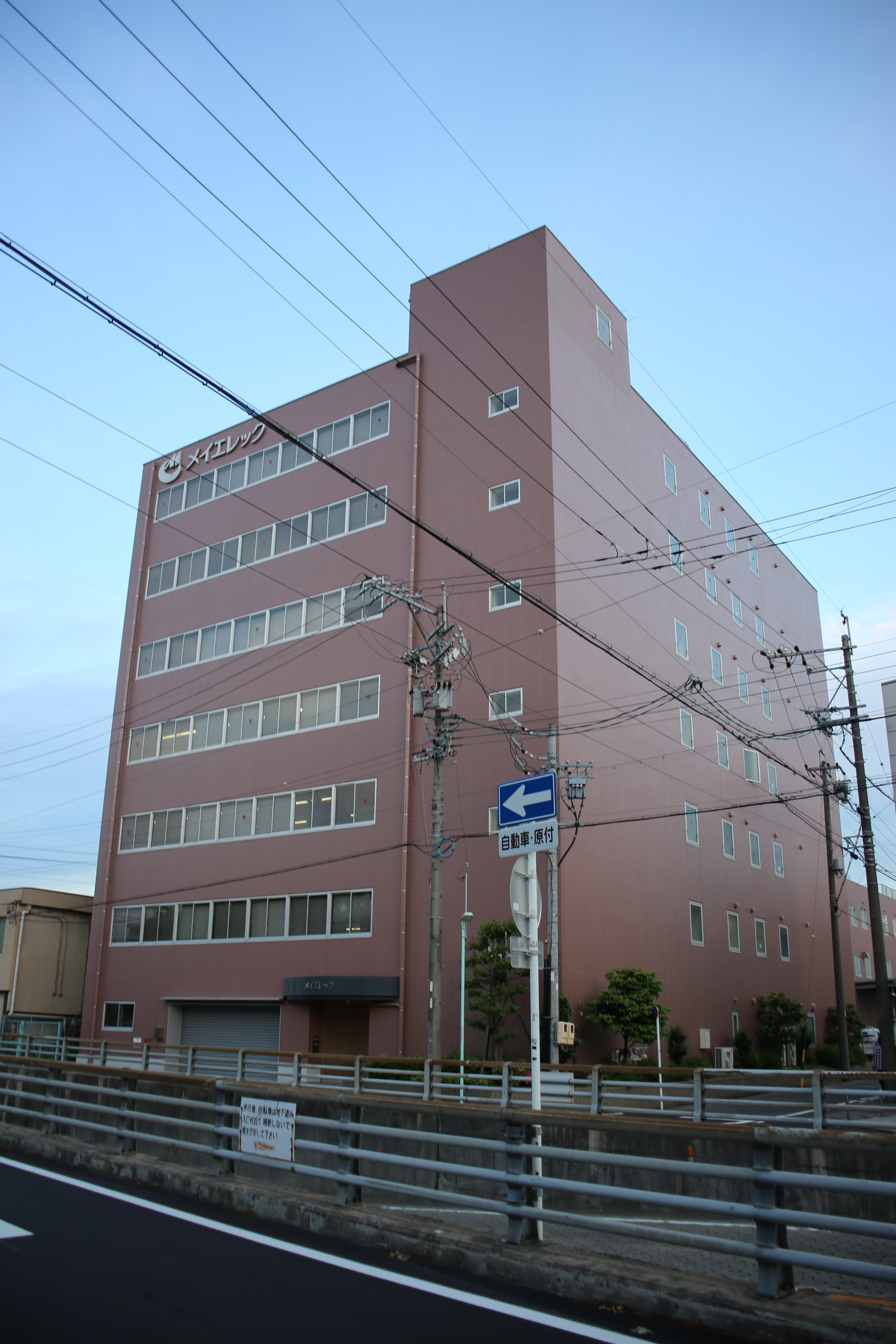 名古屋市熱田区神宮四丁目のメイエレック本社を北側公道西側より撮影